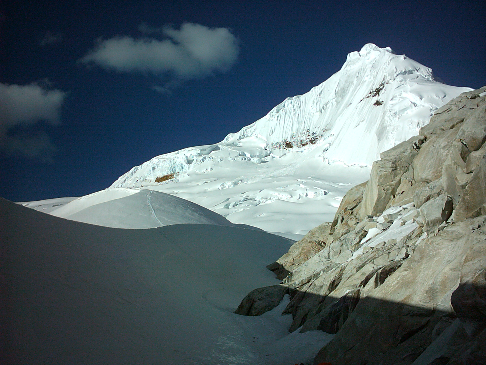 Tocllaraju